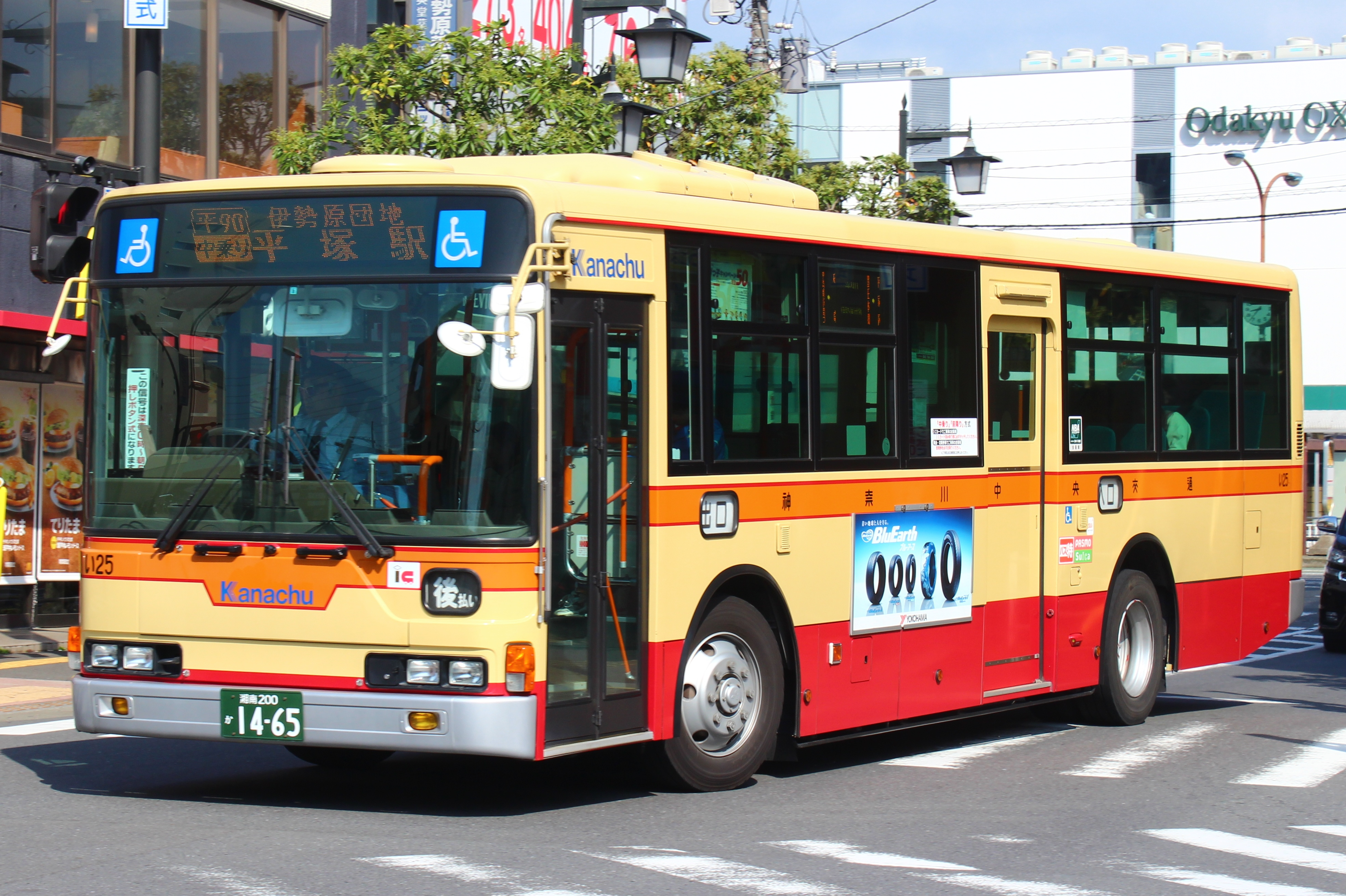 エアロスターい25